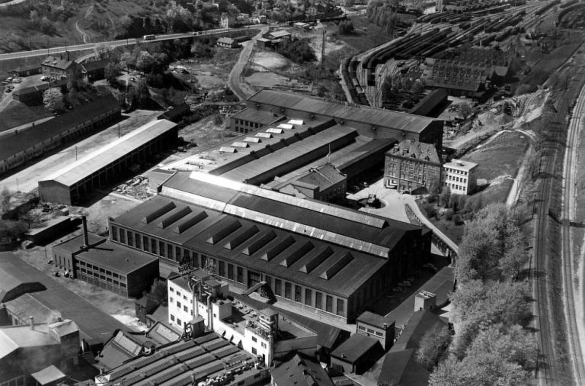 Flyfoto av Kværner Bruk, 1950.